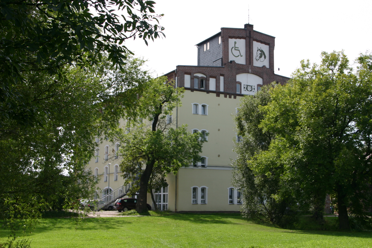 Zehringen ist ein Stadtteil von Köthen (Anhalt), Sachsen-Anhalt.